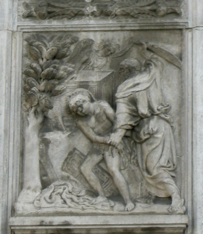 Jacopo della quercia, 10.sacrificio di isacco